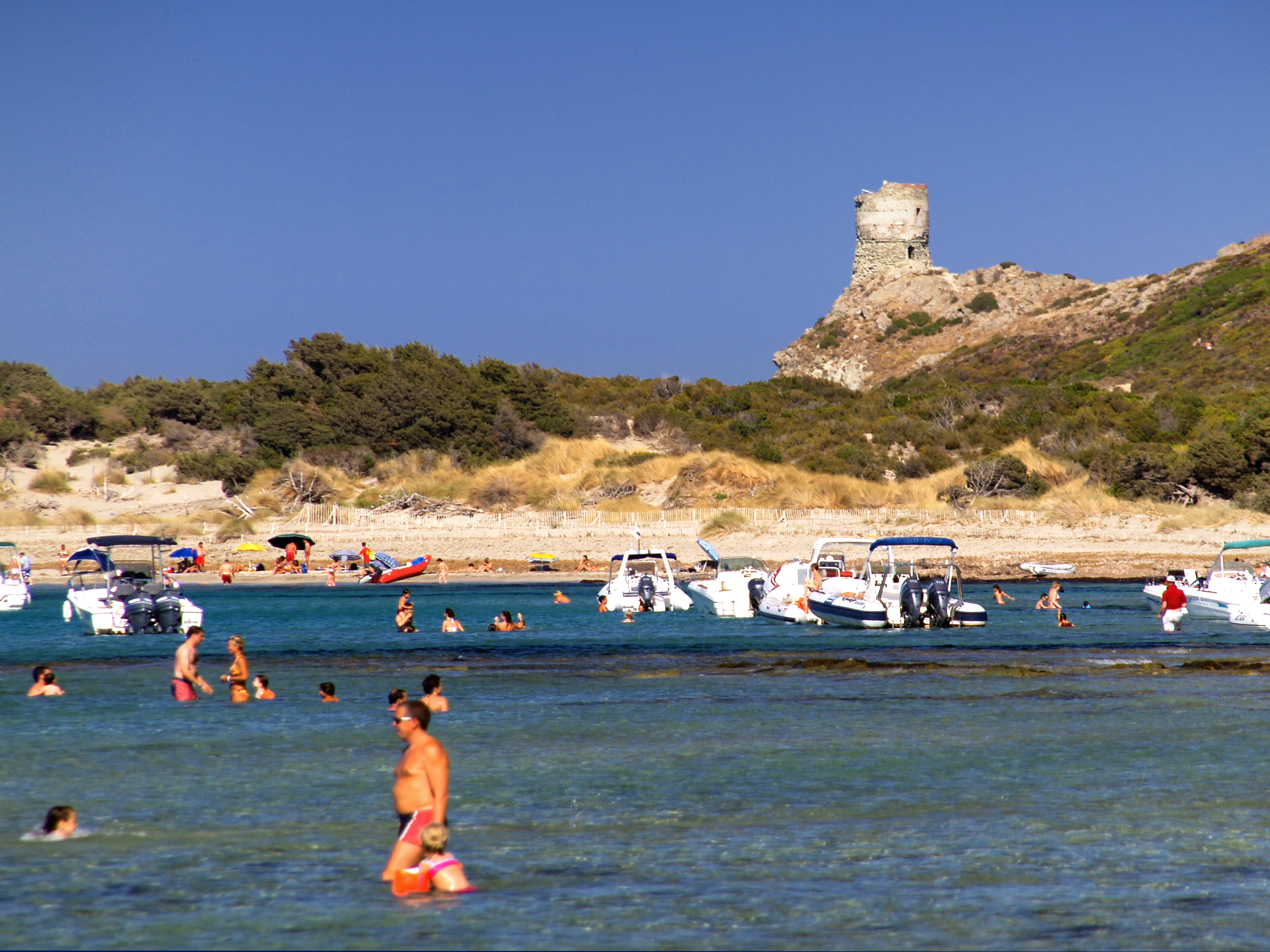 Rogliano (Corse) - Tour d'Agnello et la plage de Cala